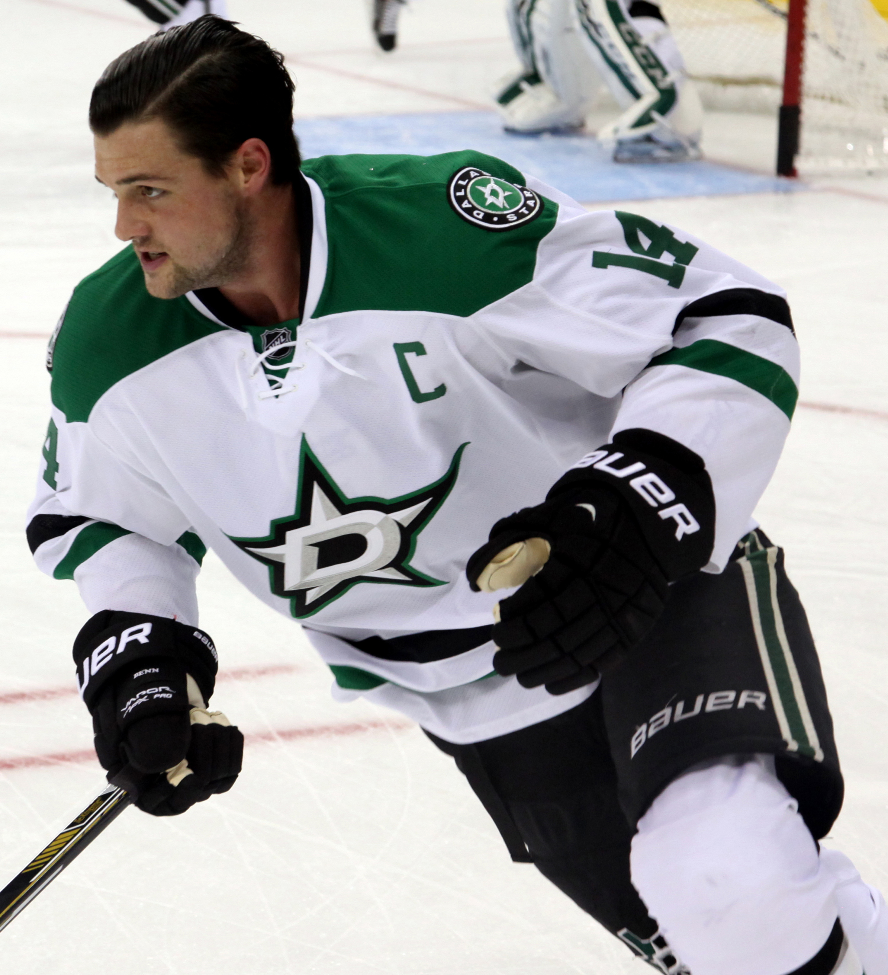 Benn in October 2014.